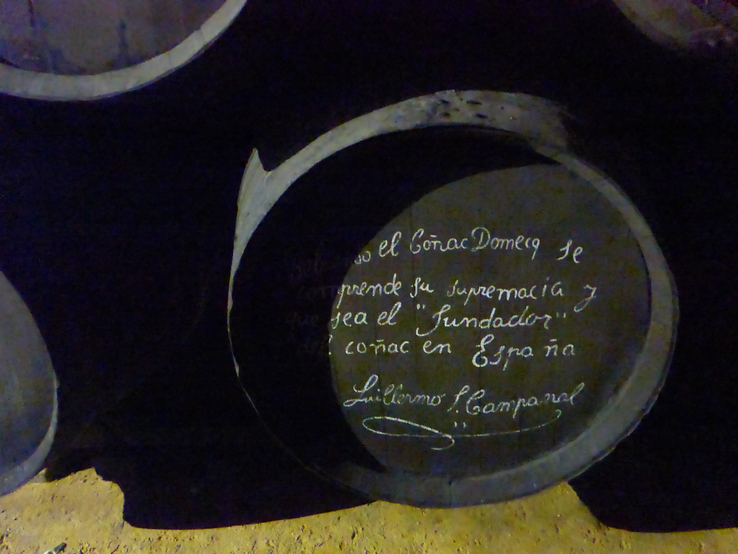 Bodegas Domecq-Fundador en Jerez de la Frontera (España)